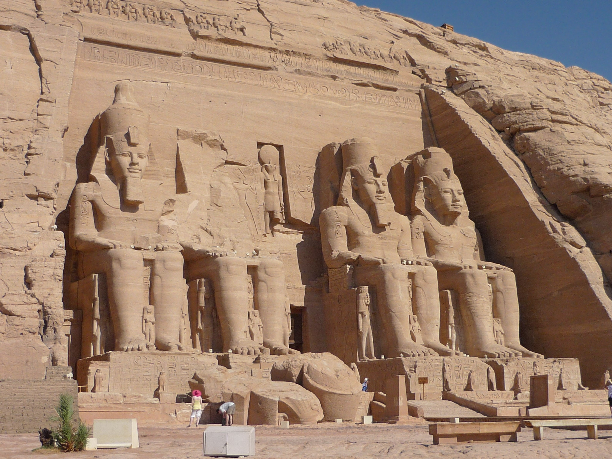 Façade du grand temple d'Abou Simbel, Égypte